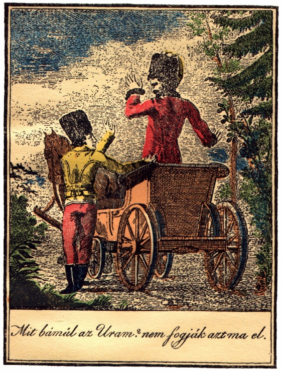 A Lúdas Matyi 1817-es bécsi kiadásából Göbwart F. S. egykorú, színes illusztrációja: A harmadik verés